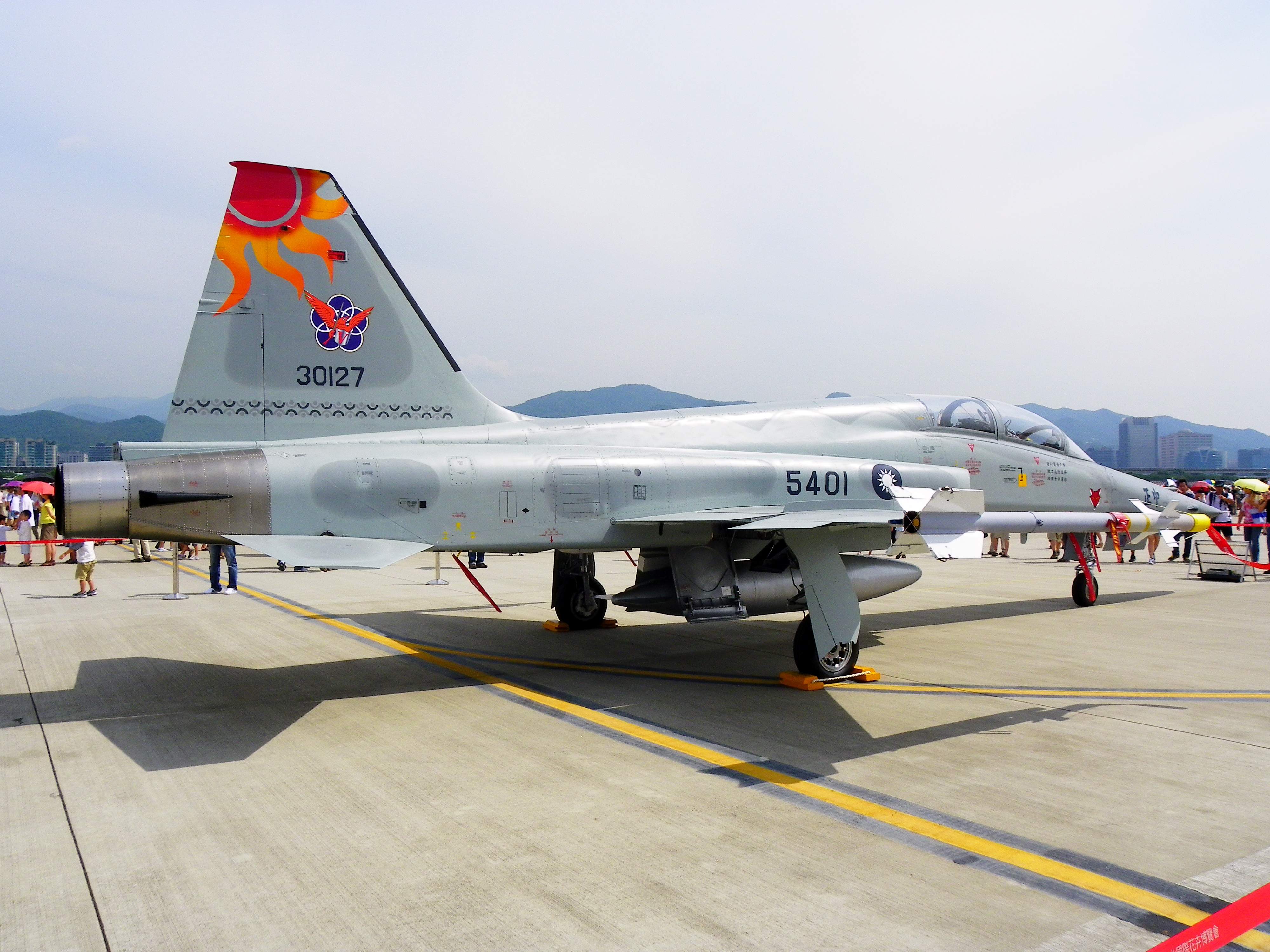 由斜後方所見之401聯隊F-5F戰鬥機5401，攝於2011年8月13日空軍松山基地營區開放活動。